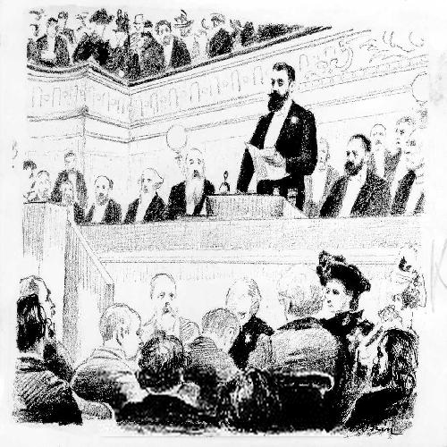 הקונגרס הציוני השני בבזל , (1898) ,במת הנשיאות בישיבת הפתיחה בנין הקונגרס מבחוץ ( ציור מאת מ. אוקין) .